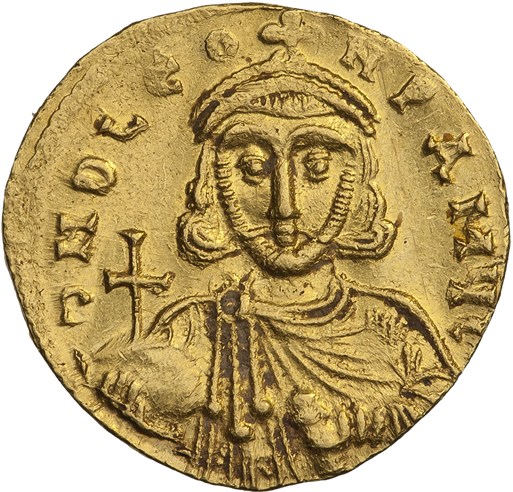 Солид. Лев III Исавр и Константин V. Ок. 720—725 гг. (аверс). Погрудный портрет Льва III, в фас; с короткой бородой; в короне и хламиде. В правой руке держава с крестом, в левой — акакия.